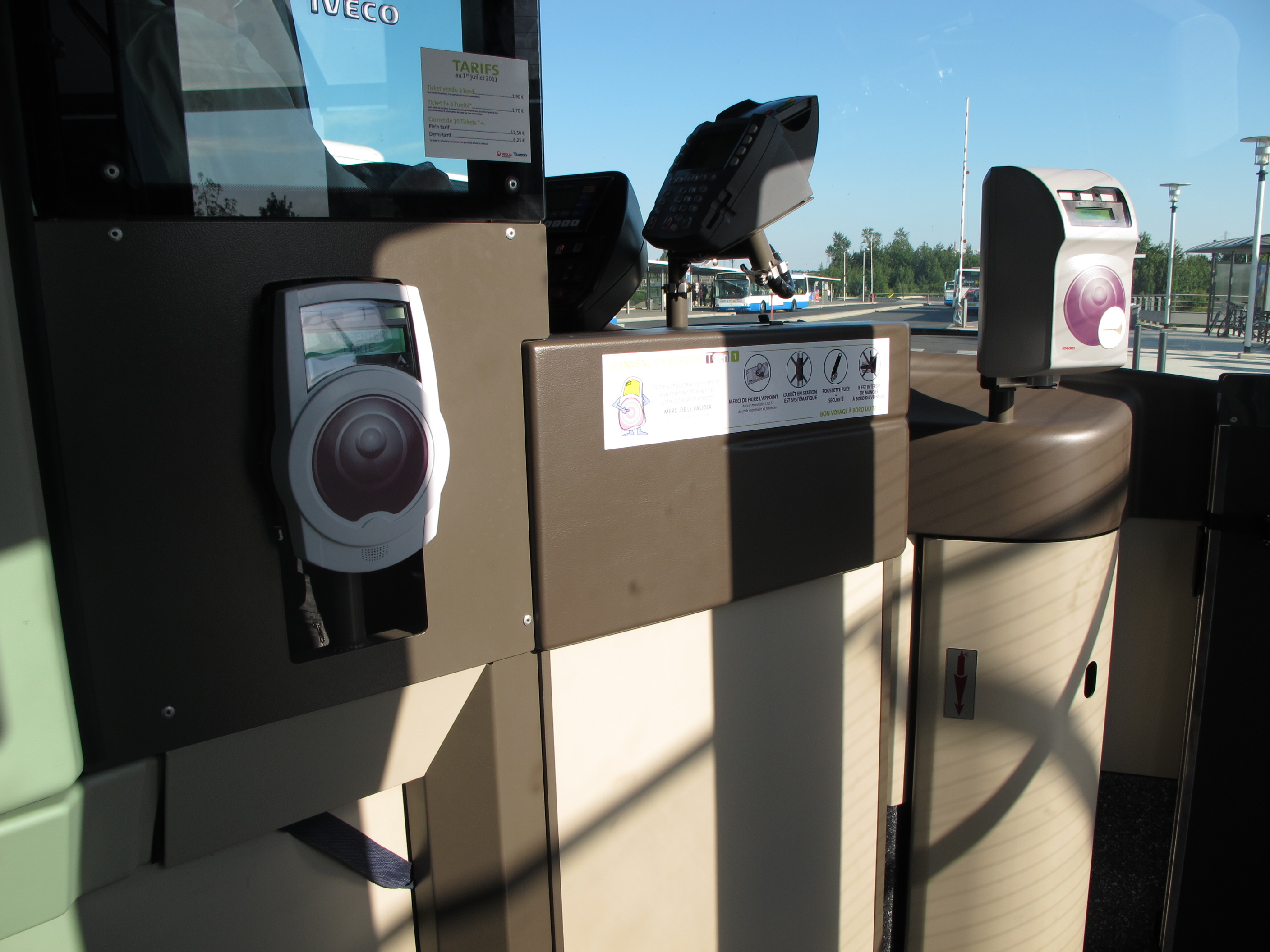 T-Zen ligne 1 - Intérieur des bus Crealis Neo 12 ; entre Corbeil-Essonnes (Essonne) et Lieusaint (Seine-et-Marne), France